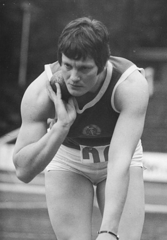 Maritta Lange ADN-ZB Demme 16.08.1972 Berlin: DDR-Olympiamannschaft-1972-Leichtathletik: Maritta Lange (SC Chemie Halle)